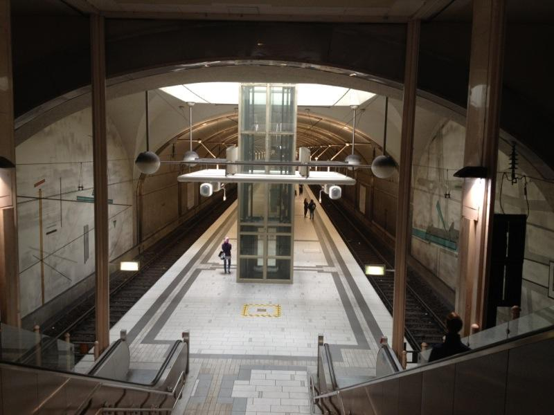 S-Bahn-Station in Offenbach-Kaiserlei Eingang Berliner-Straße